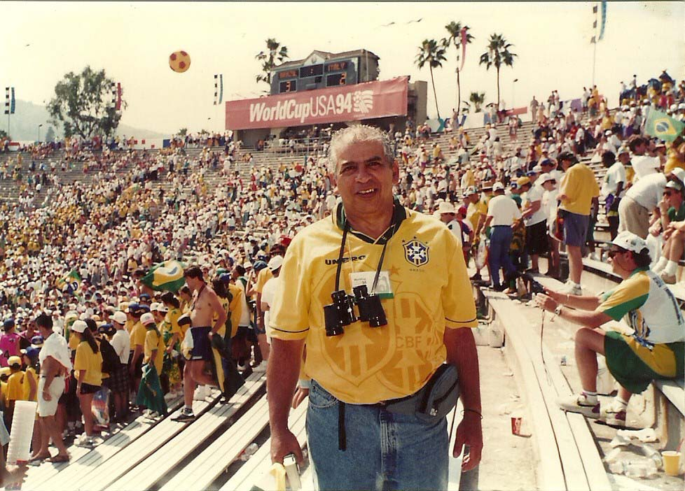 EUA, em 1994